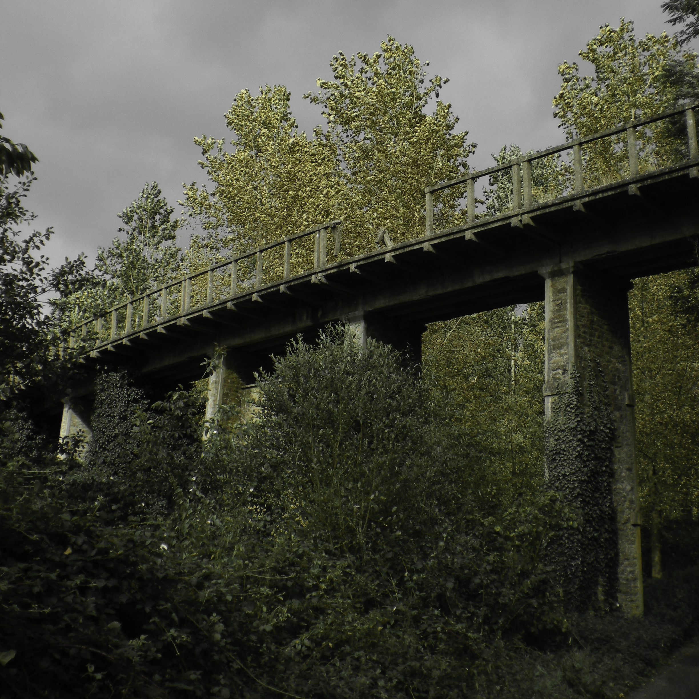 Chemins de fer des Côtes-du-Nord: "Passerelle des Clairets à Jugon-les-Lacs. La ligne de chemin de fer départementale Collinée-Jugon ne fonctionne qu'une vingtaine d'années. Le premier tronçon de la ligne Collinée-Jugon-Dinan est inauguré en 1924, et son abandon est effectif dans les années 1950. De nombreuses infrastructures témoignent de son passage, comme ce viaduc, ou le tunnel sous la Petite Chaussée." '"Dans ma jeunesse" on pouvait monter sur ce pont en faisant attention de ne pas tomber à travers les trous mais l'accès est maintenant impossible à cause de la végétation...'